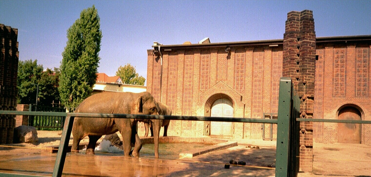 Elefantenhaus im Zoo Leipzig